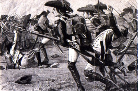 Défaite vendéenne à Luçon